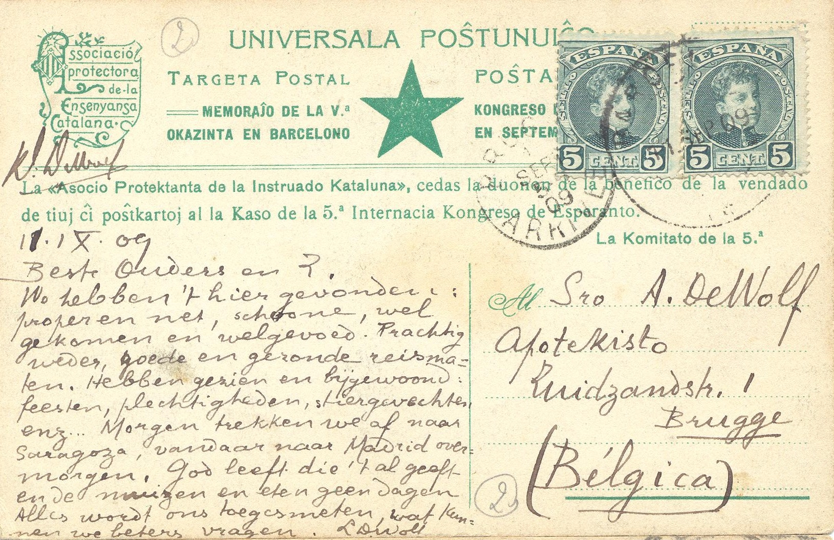 Postkaart van Leonie De Wolf, met vakantie in Spanje, aan haar vader Adolf, apotheker te Brugge (18 september 1909)